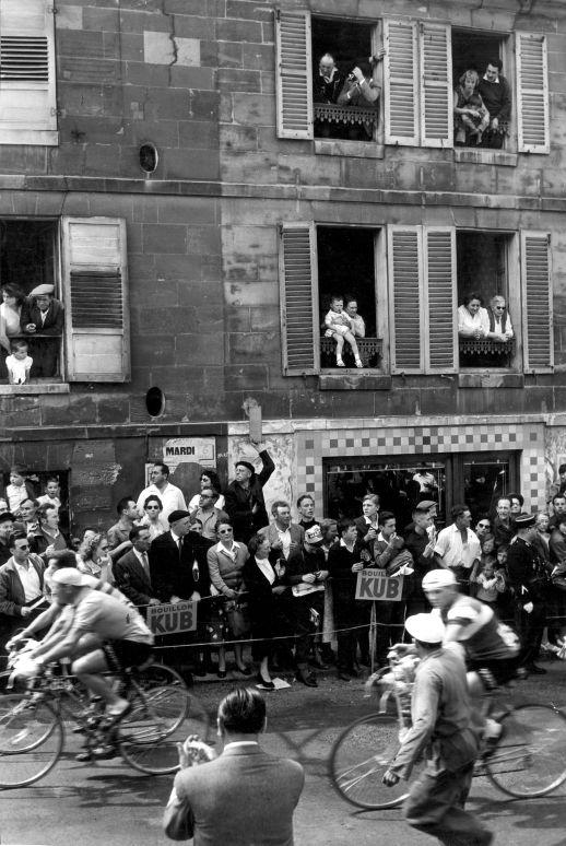 Spaarnestad Photo, SFA001014018 Toeschouwers kijken naar de renners die bevoorraad worden. Tour de France 1958. Plaats onbekend. Collectie SPAARNESTAD PHOTO/Henk Blansjaar People watching the cyclists being provisioned. Tour de France 1958. Location unknown. Voor meer informatie en voor meer foto’s uit de collectie van Spaarnestad Photo, bezoek onze Beeldbank: U kunt ons helpen onze kennis van de fotocollecties te verrijken door tags en commentaren toe te voegen. Herkent u mensen of locaties of heeft u een bijzonder verhaal te vertellen bij één van de foto’s, laat dan een reactie achter (als u ingelogd bent bij Flickr) of stuur een mailtje naar: You can help us gain more knowledge on the content of our collection by simply adding a comment with information. If you do not wish to log in, you can write an e-mail to